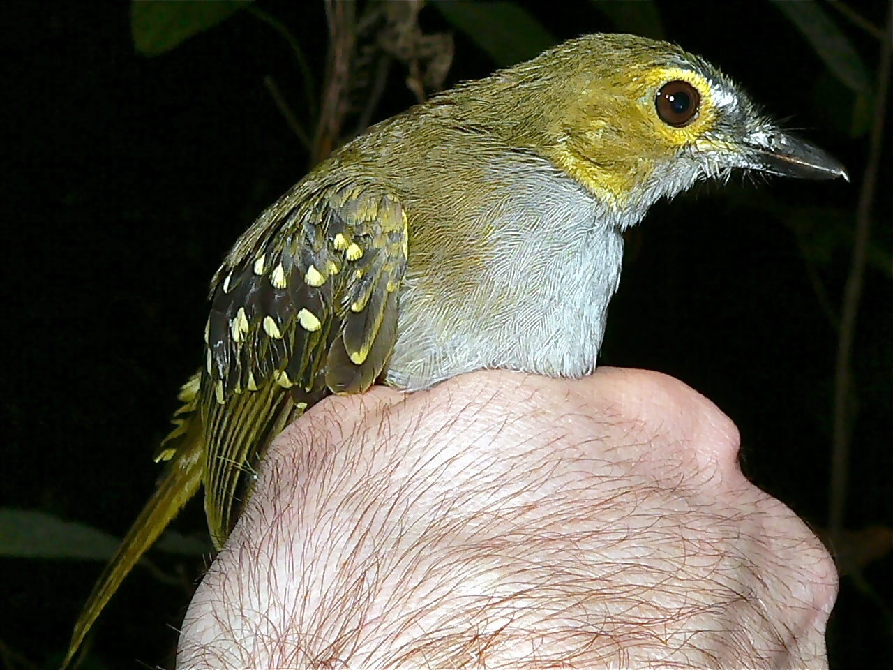 Korup NP, CAMEROON